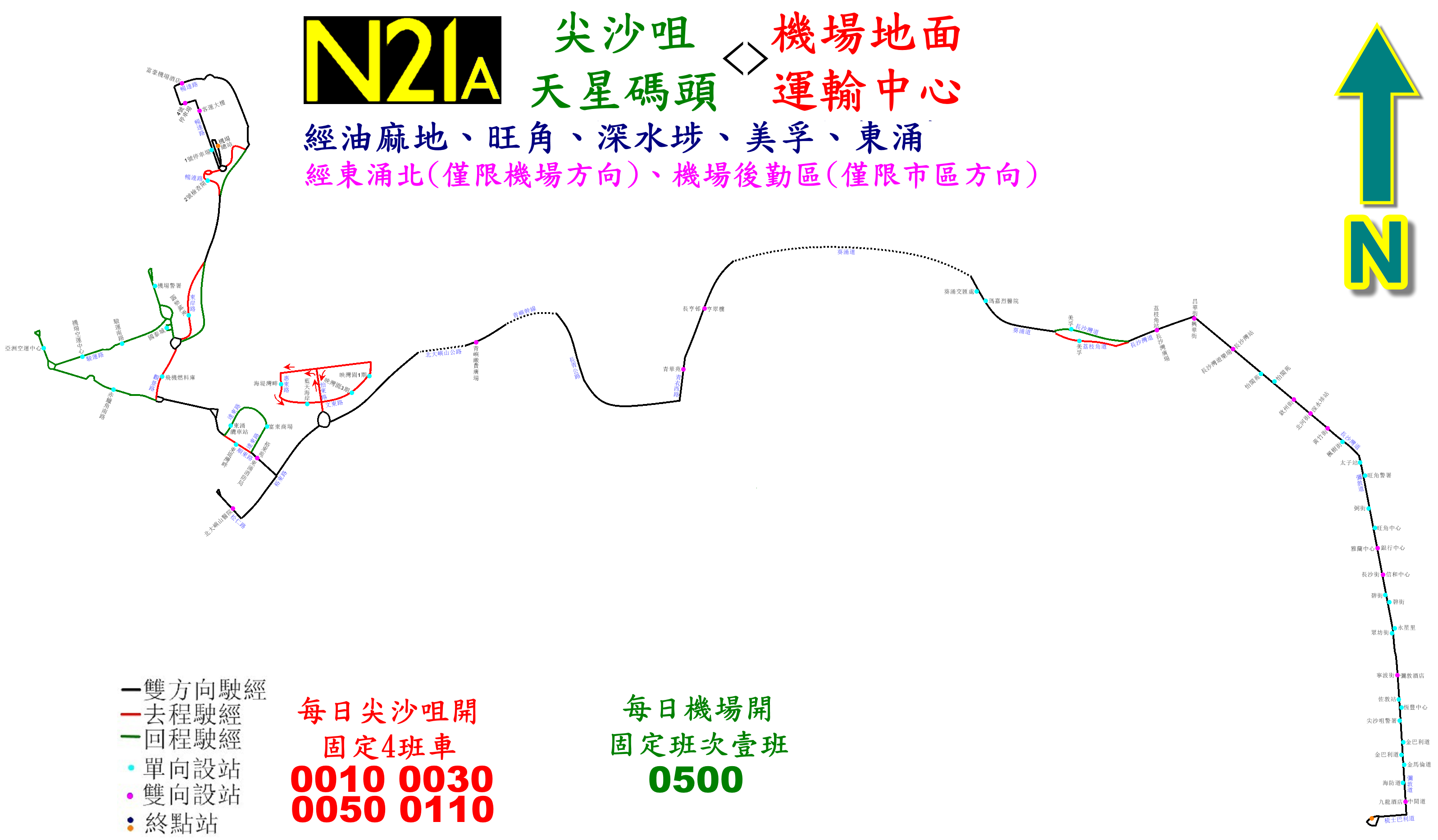 中文（香港）: 城巴N21A線的走線圖